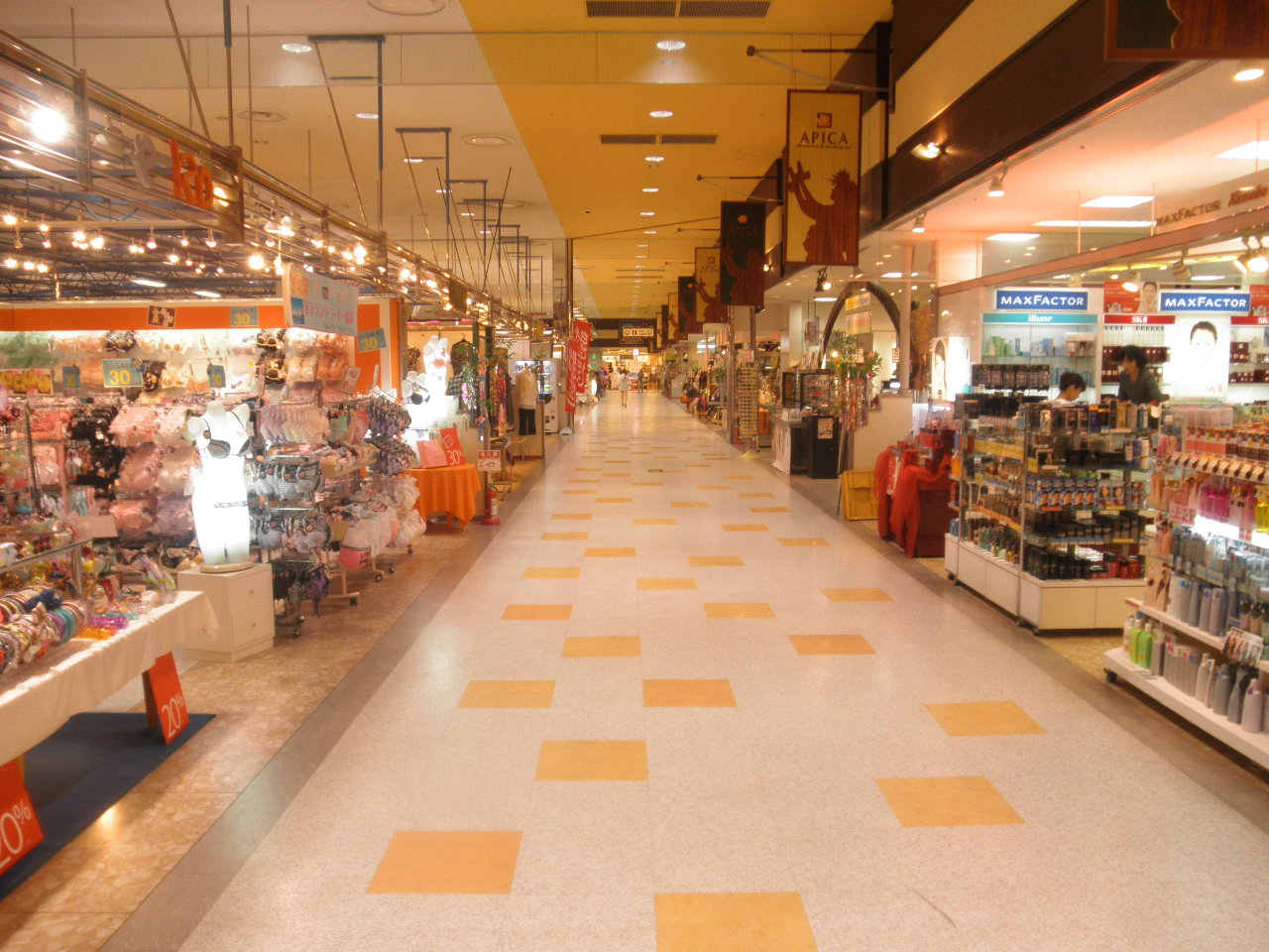 ショッピングプラザアピカ 1F